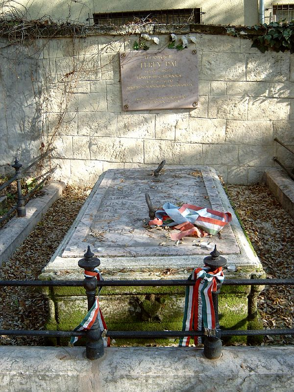 Térey Pál honvéd huszárőrnagy (Nagykároly 1831. augusztus 28. – Promontor 1883. június 12.) sírja Budapesten. Budafoki temető: 20-1-17.